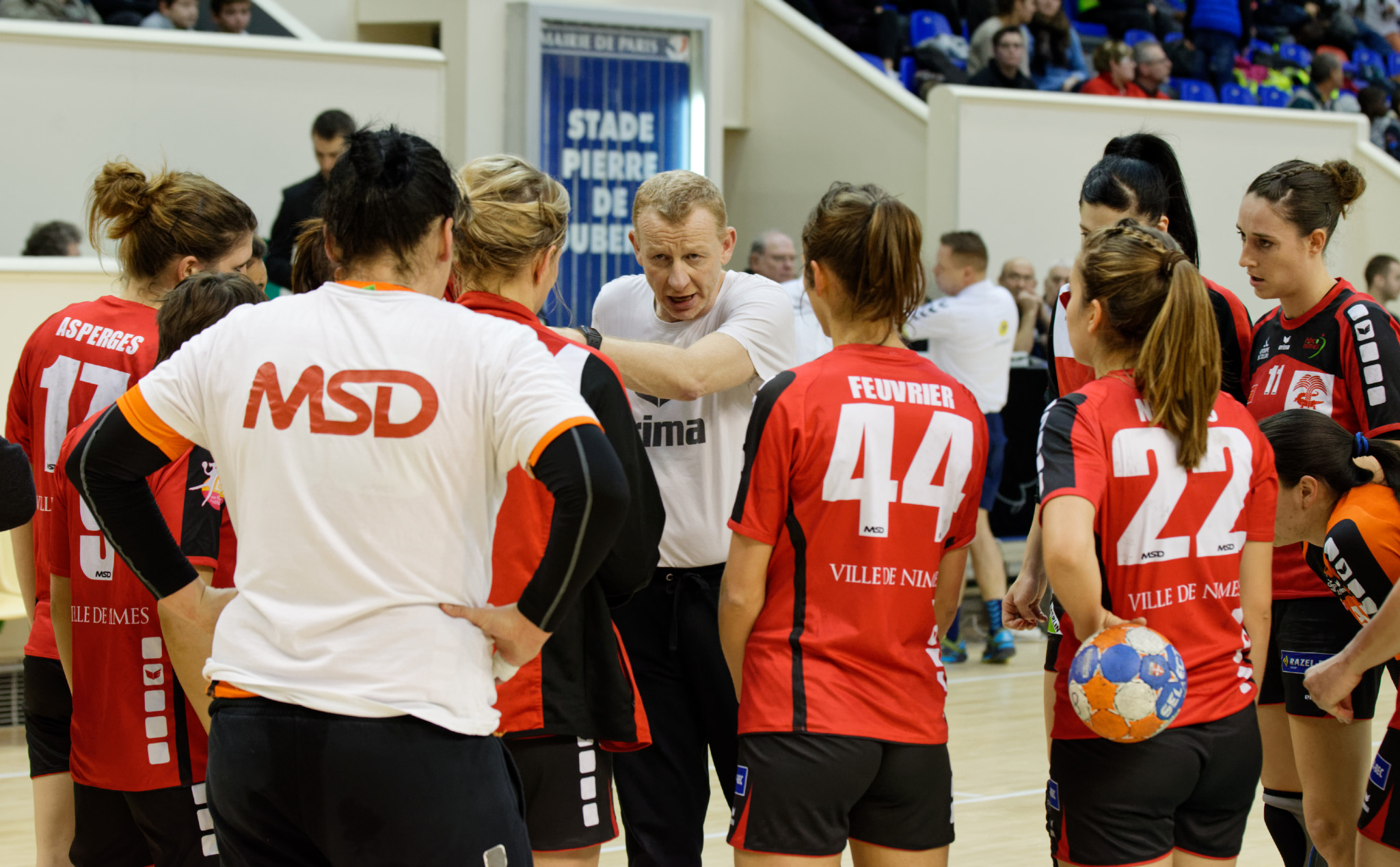 Rencontre de championnat entre Issy Paris Hand et HBC Nîmes. A Coubertin, le 6 janvier 2016.